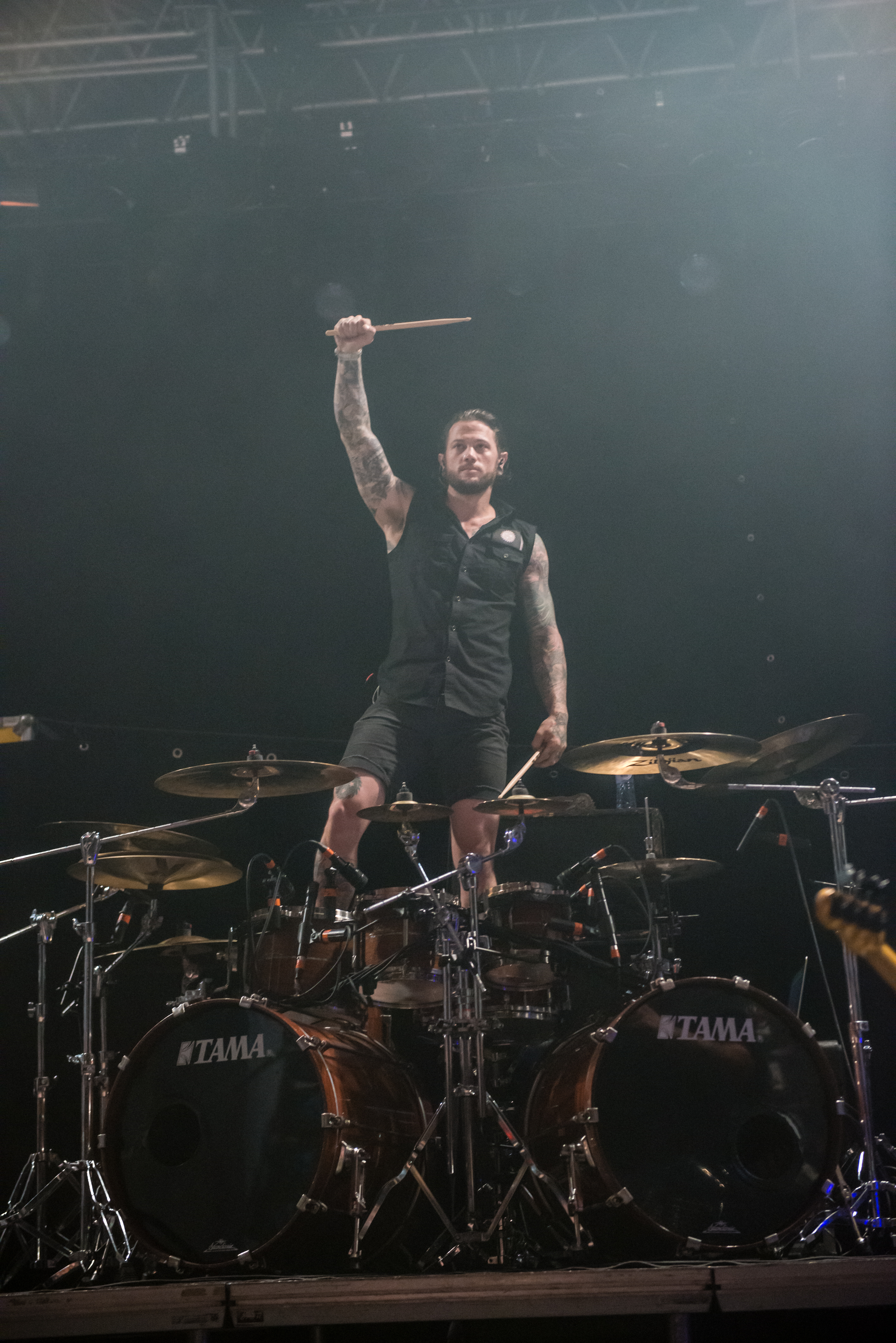 'Impericon Festival 2015; Oberhausen Turbinenhalle': 'Whitechapel'